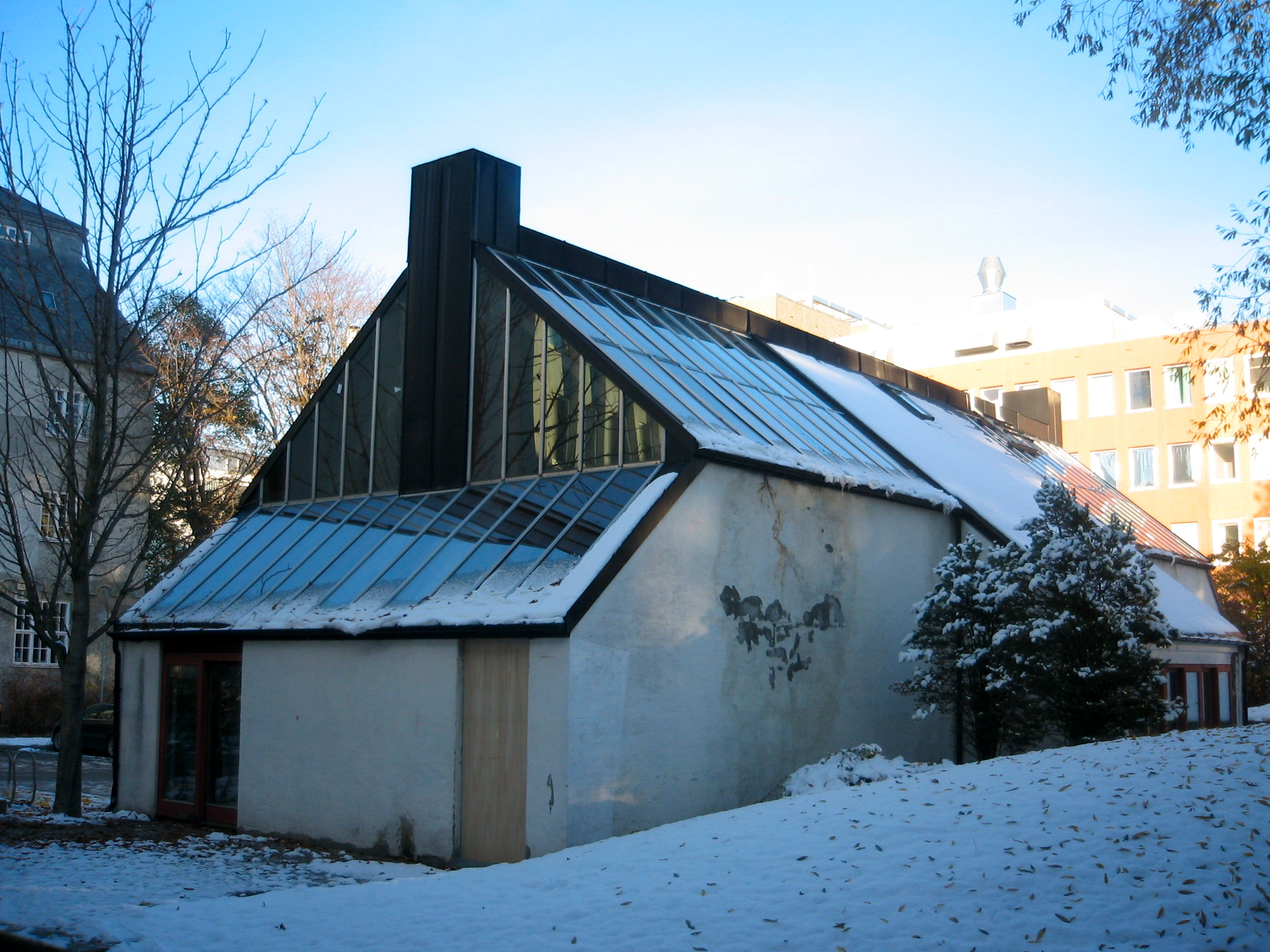 Forsøkshuset Skiboli på Campus NTNU Gløshaugen sett fra sørvest